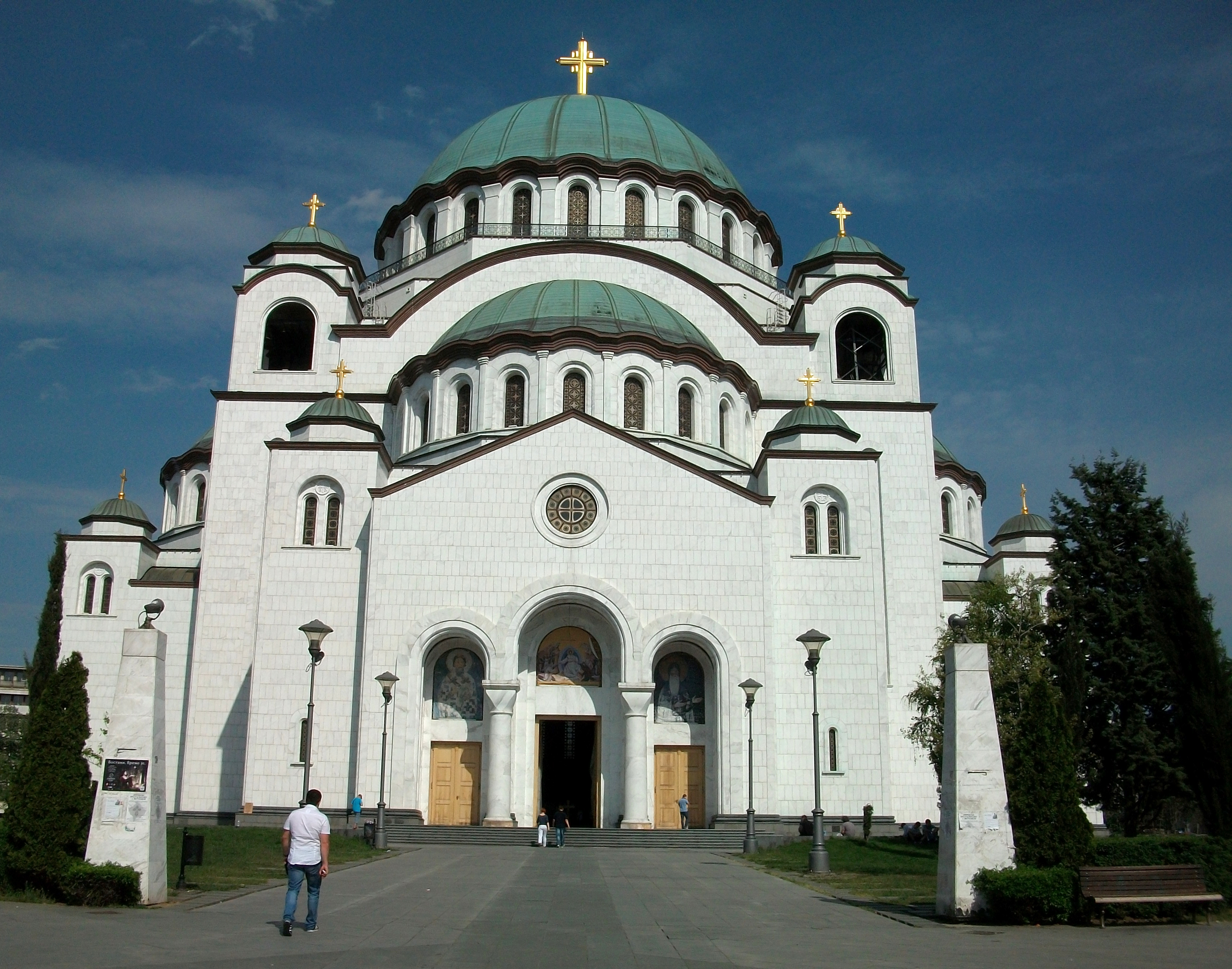 Kathedrale des Heiligen Sava, Belgrad (Serbien)